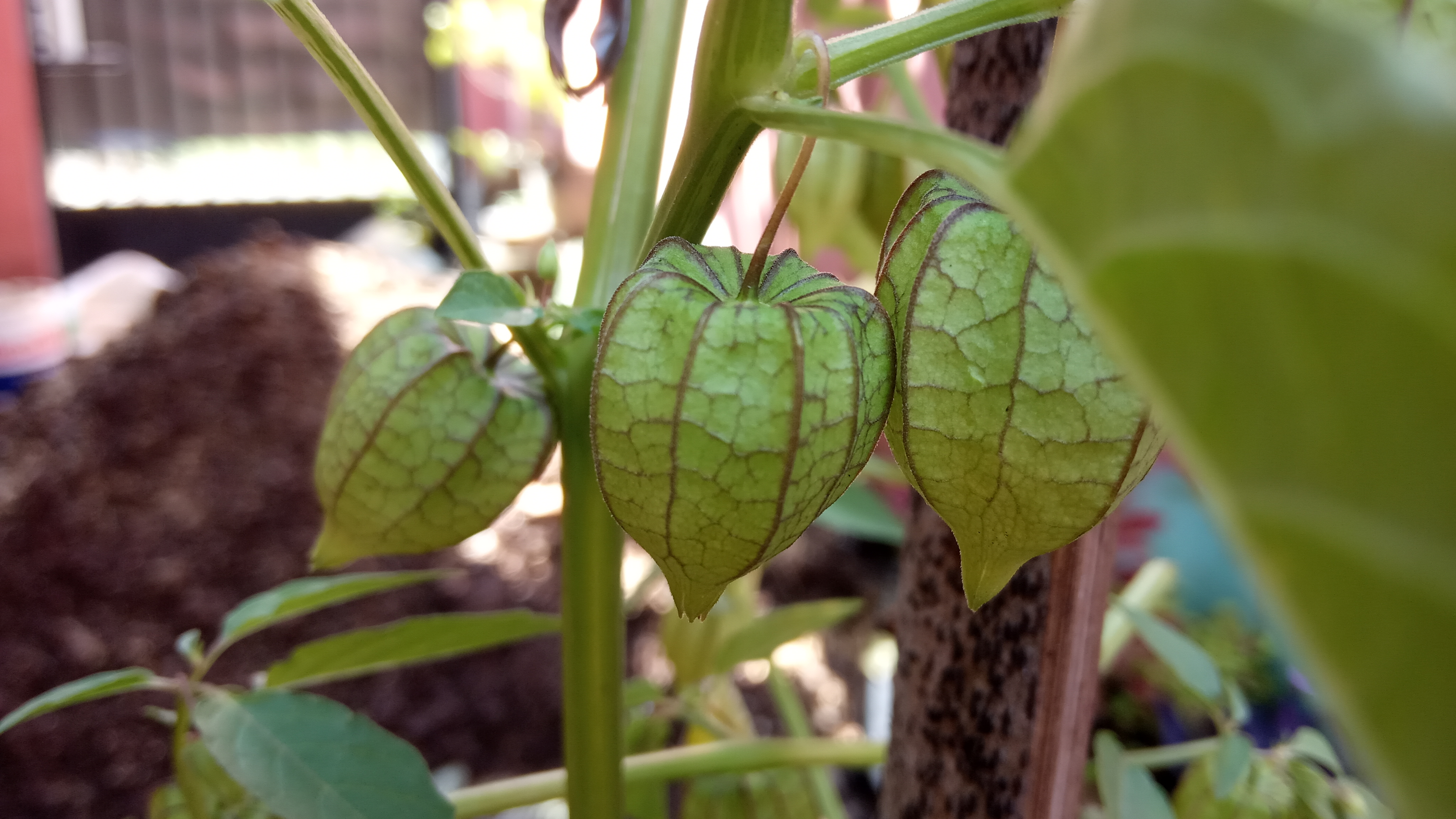 Buah Ciplukan Lokal